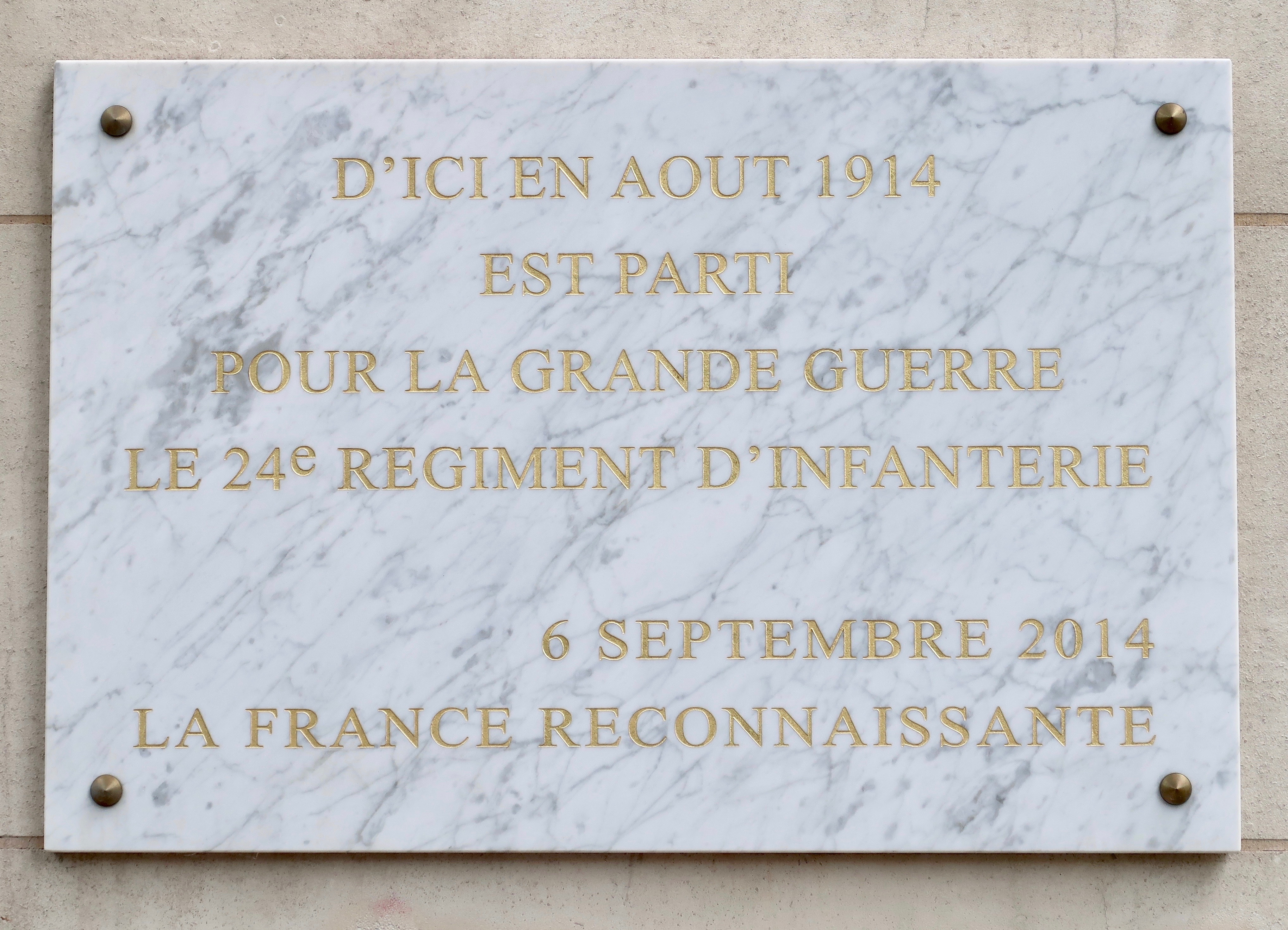 Plaque en hommage au 24e régiment d'infanterie devant le Cercle national des armées, 8 place Saint-Augustin (Paris, 8e).